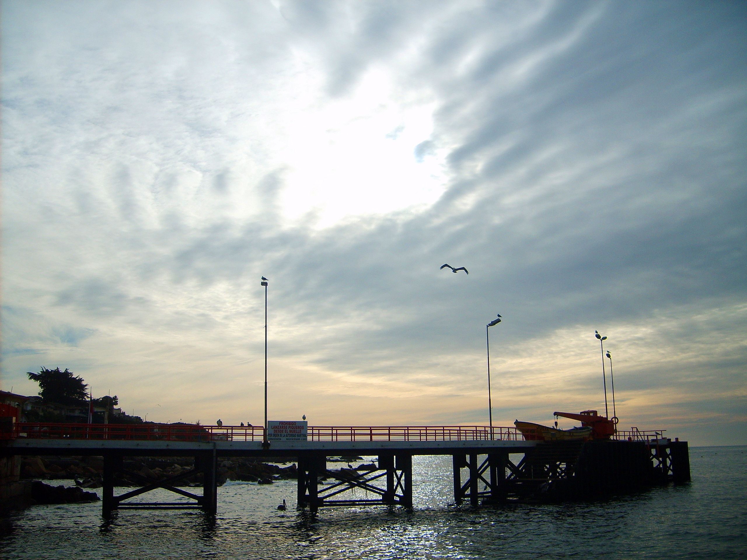 Muelle de El Quisco, Valparaíso, Chile. Inaugurado en 1997.